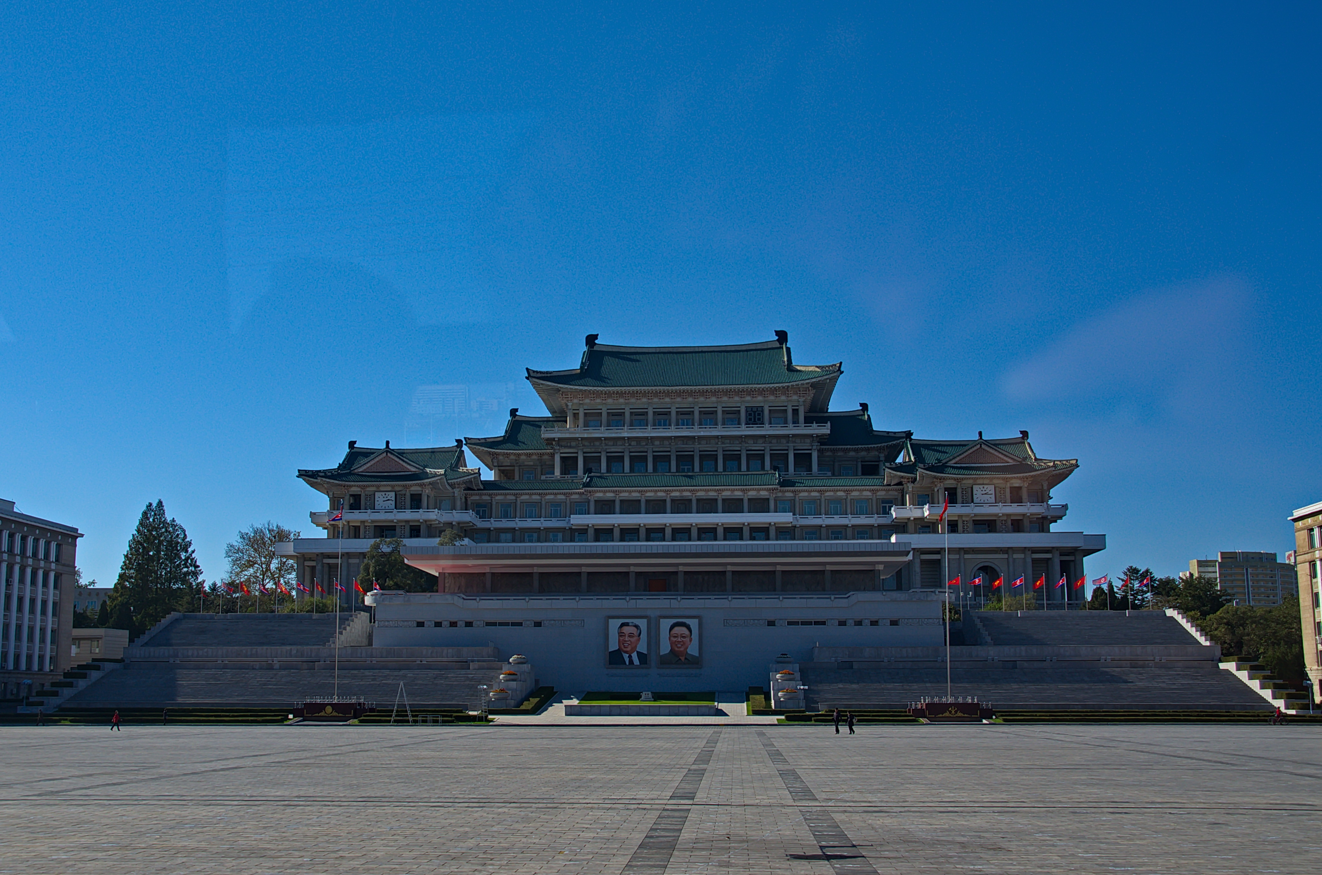 Nordkorea 2015 - Pjöngjang - Großer Studienpalast